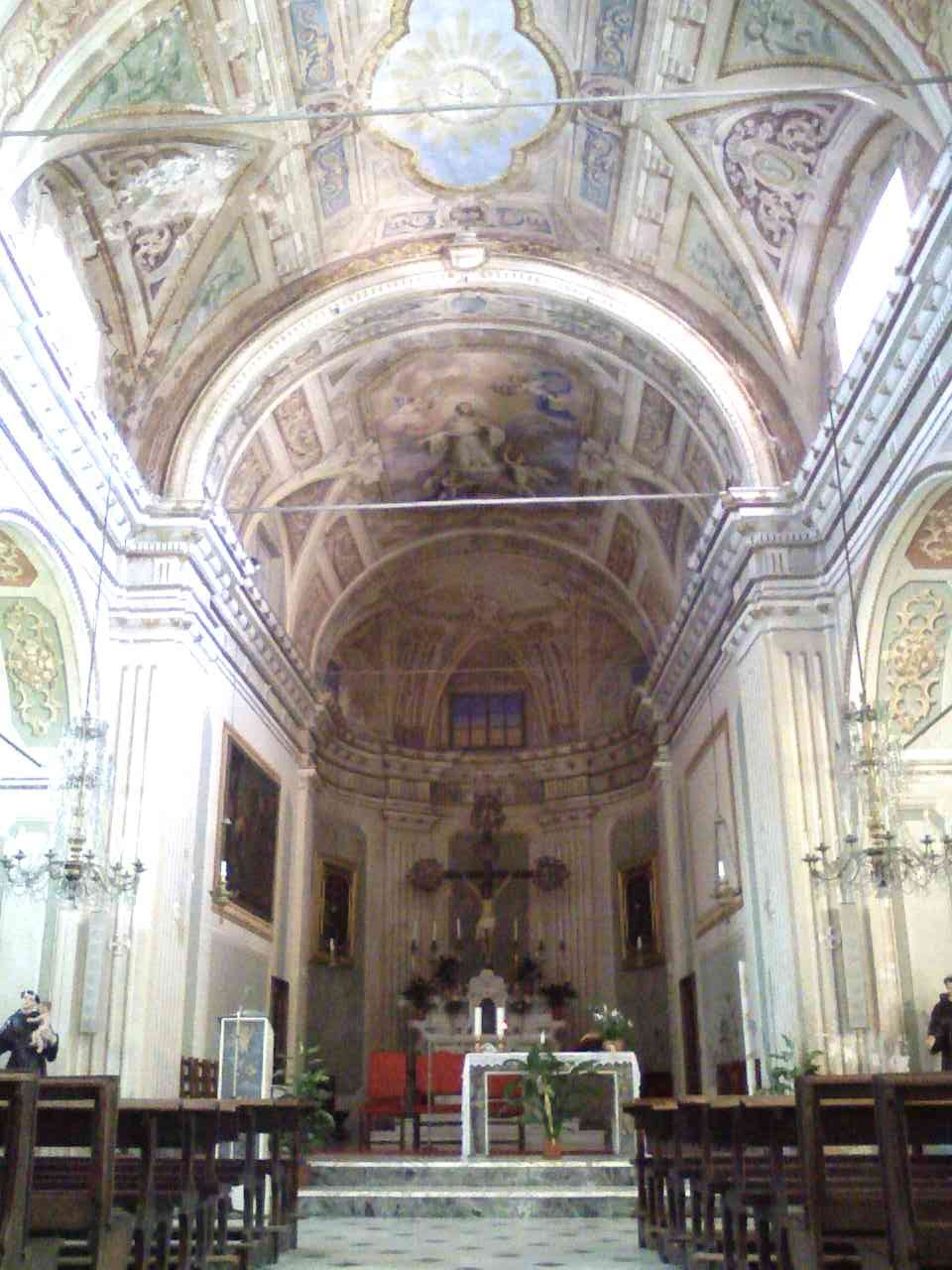 chiesa di san bernardo in Stella, presbiterio (Italy)